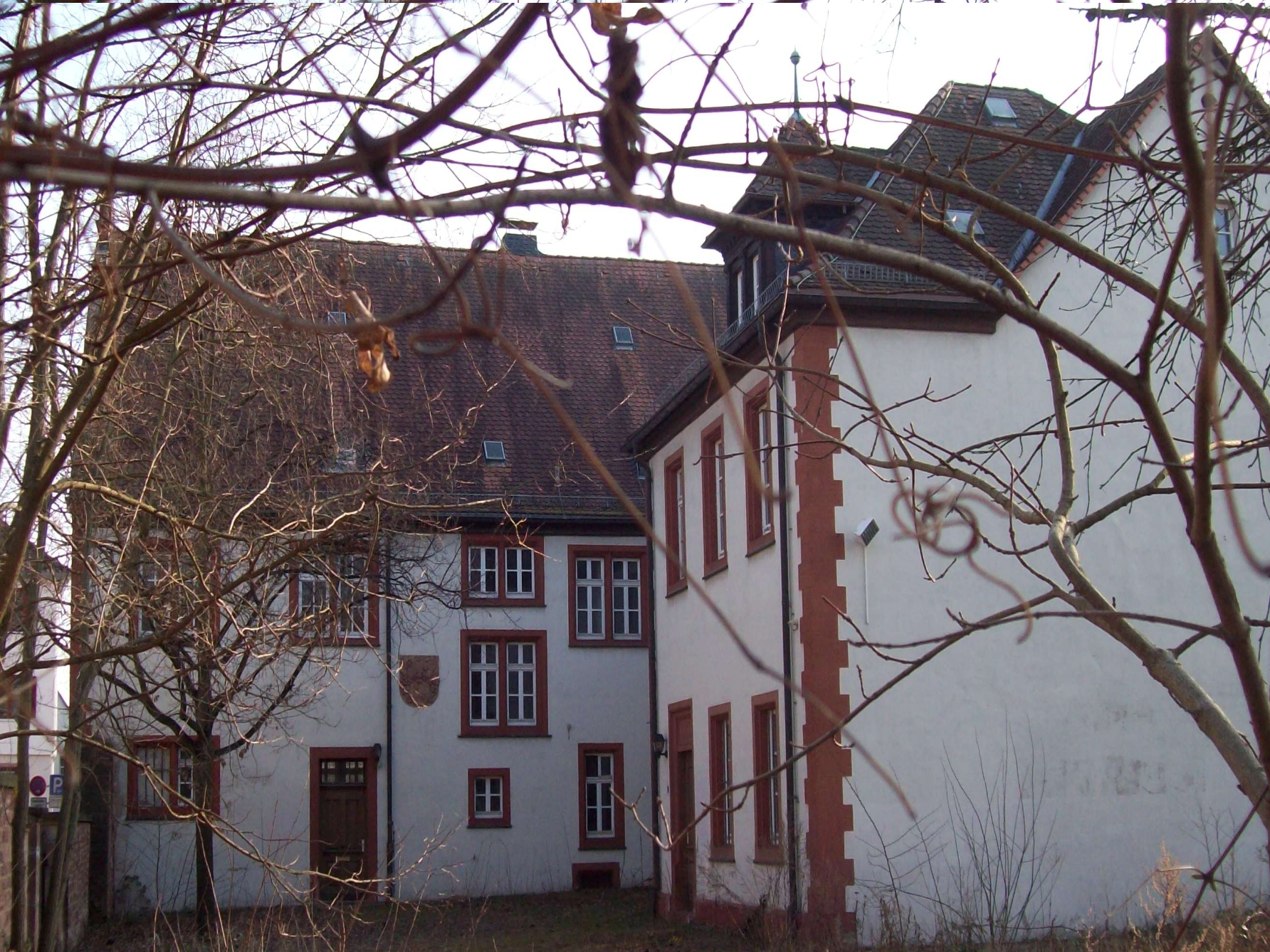 Kurfürstliche Schneiderei Aschaffenburg erbaut um 1600, mit Anbau 1903